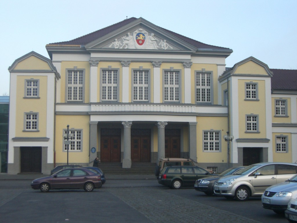 Ośrodek kultury "Festhalle" w Viersen w Niemczech.